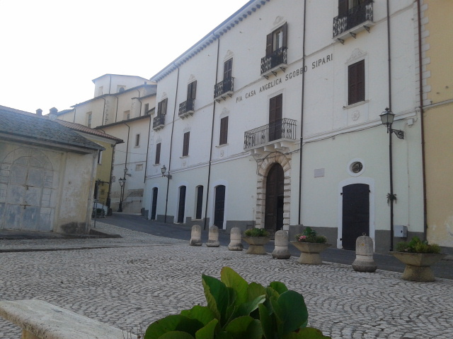 Palazzo della scuola Angelica Sgobbo Sipari